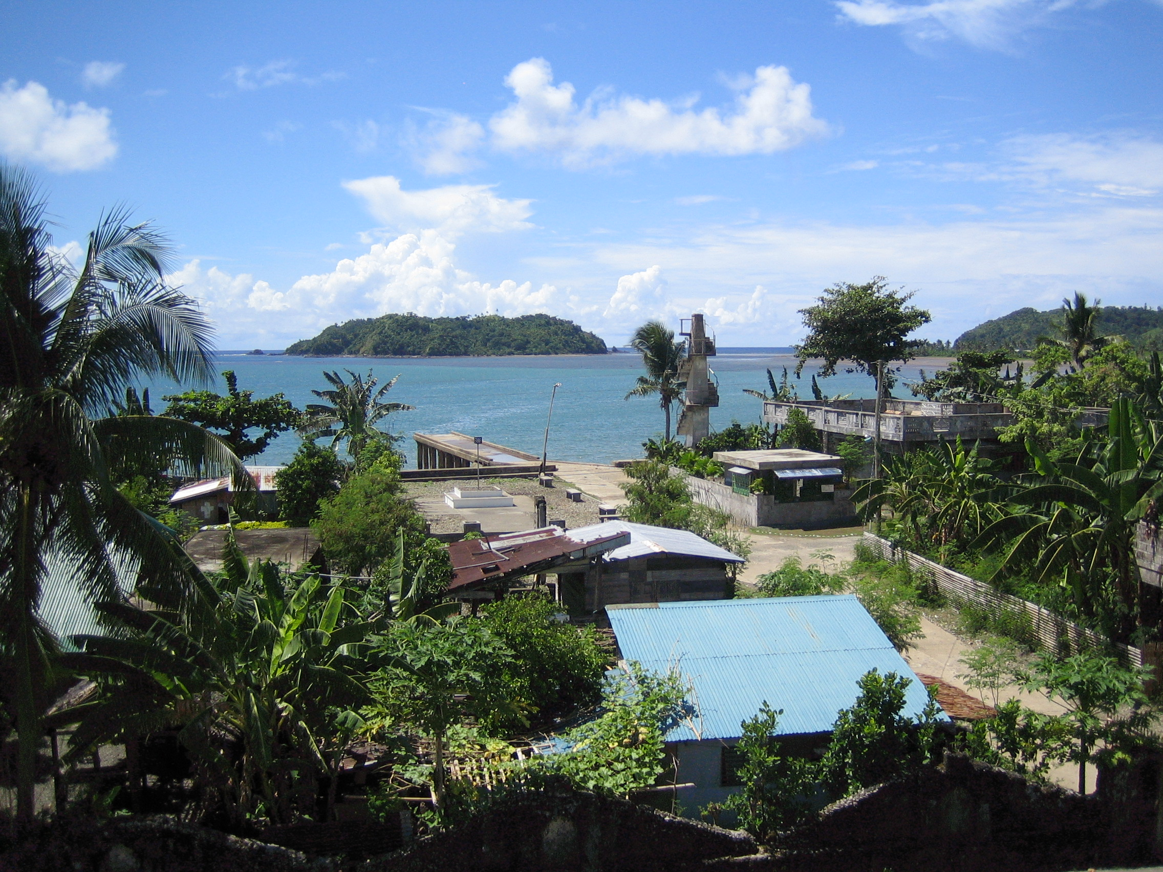 Gigmoto, Catanduanes, Philippines